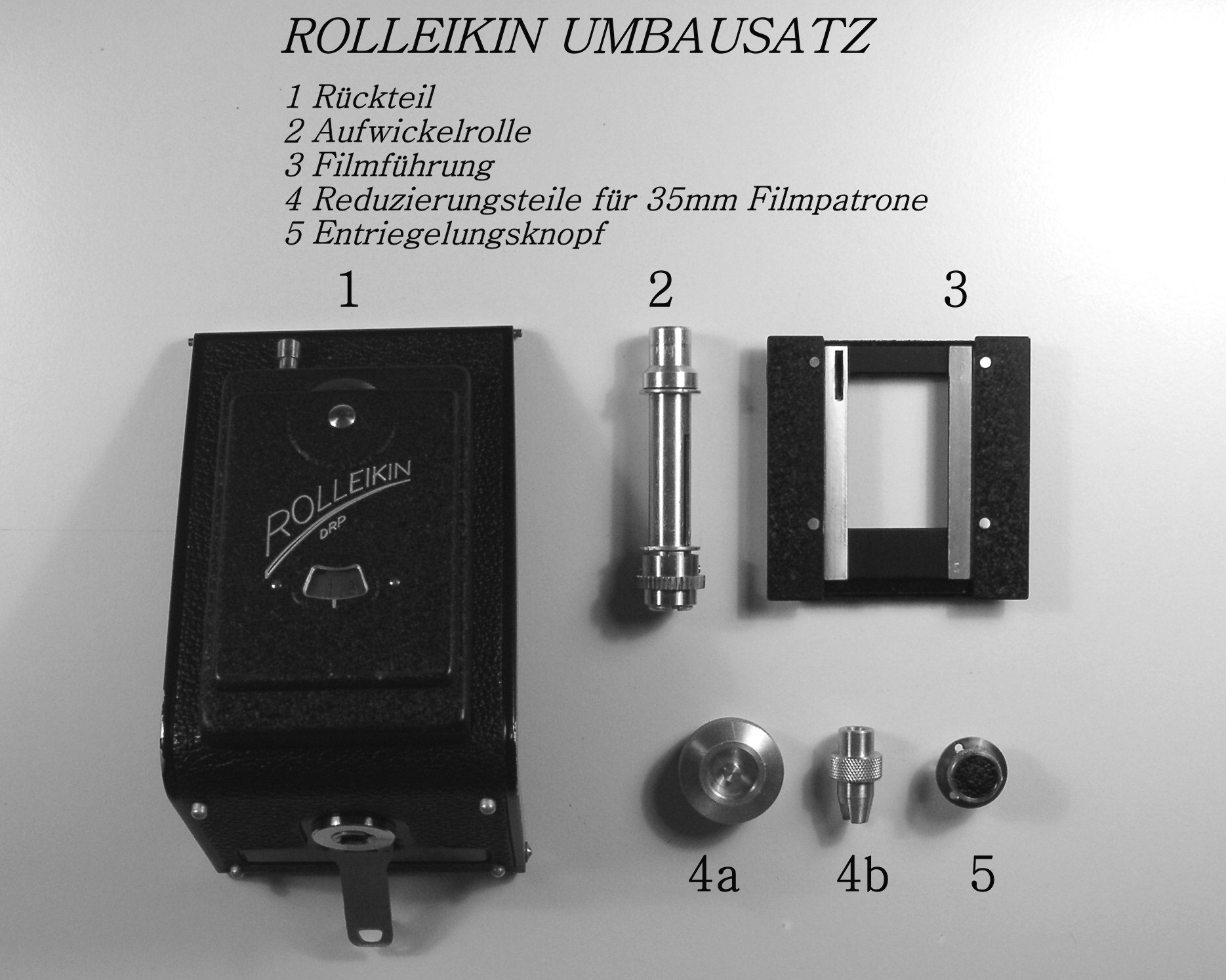 Rolleikin-Bausatz für 6x6 Rolleicord